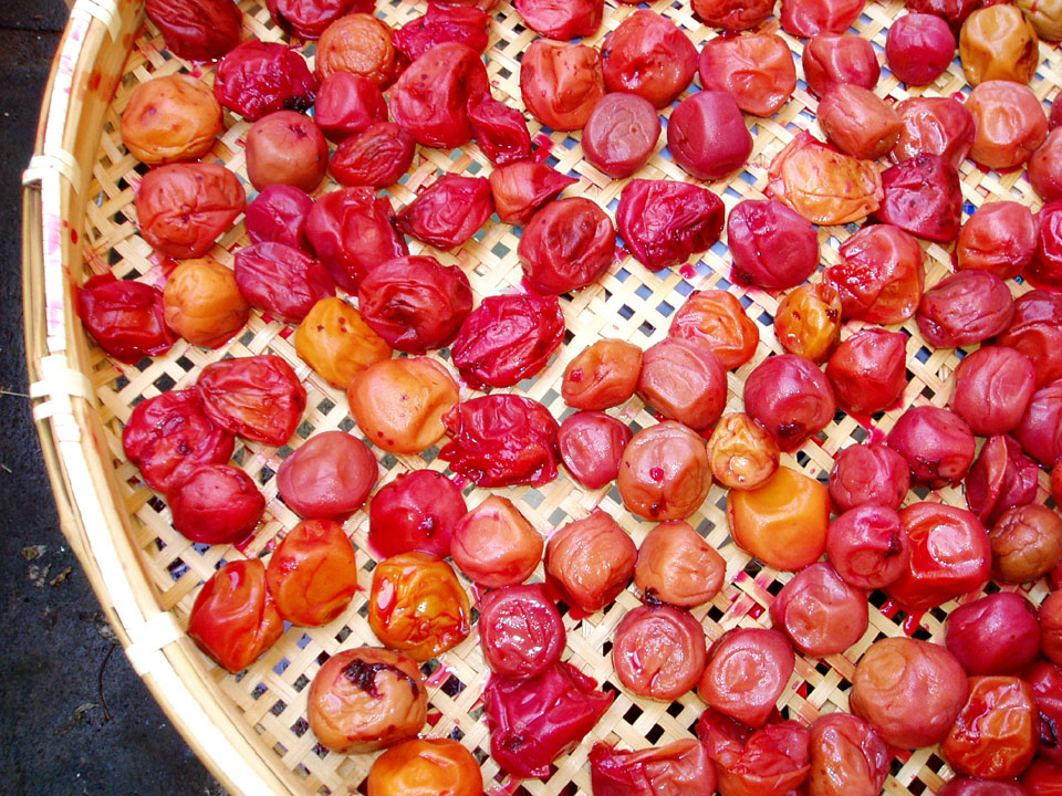 Umeboshi on a zaru